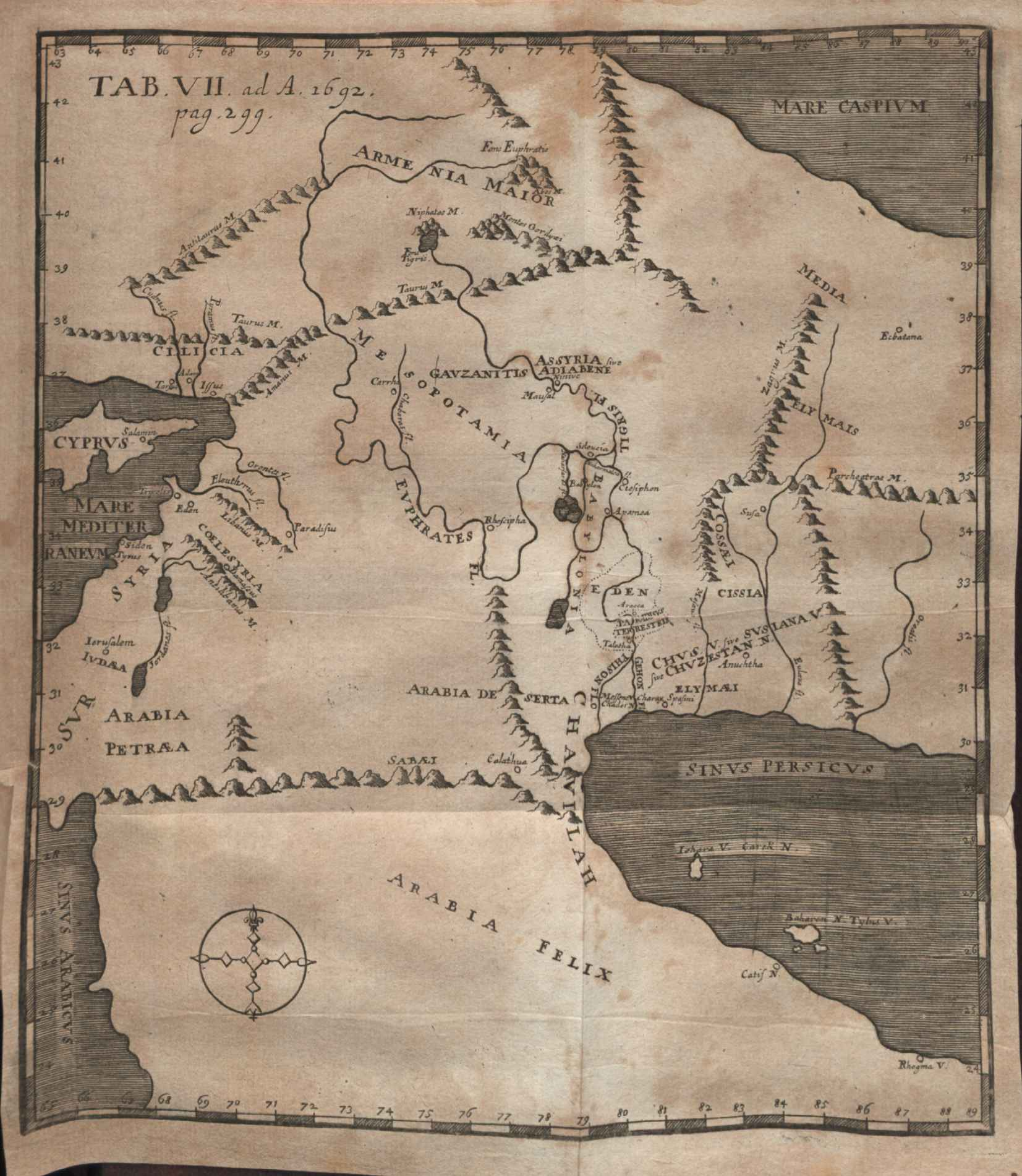 Illustration